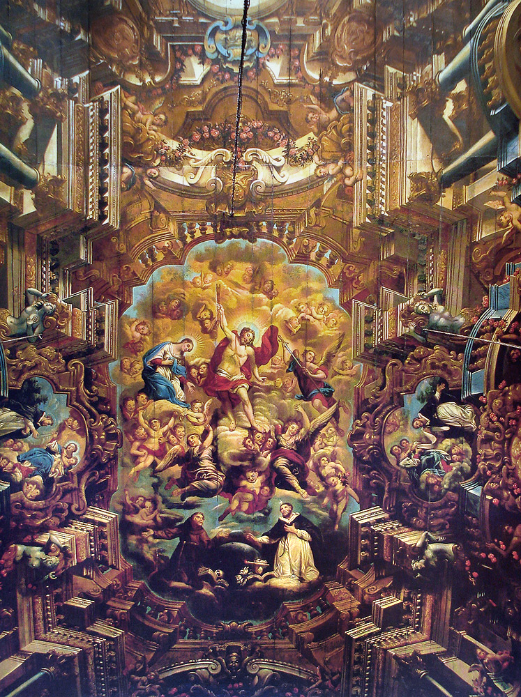 José Joaquim da Rocha: teto da Igreja de São Domingos, Salvador, Brasil.